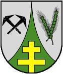 Wappen Düngenheim